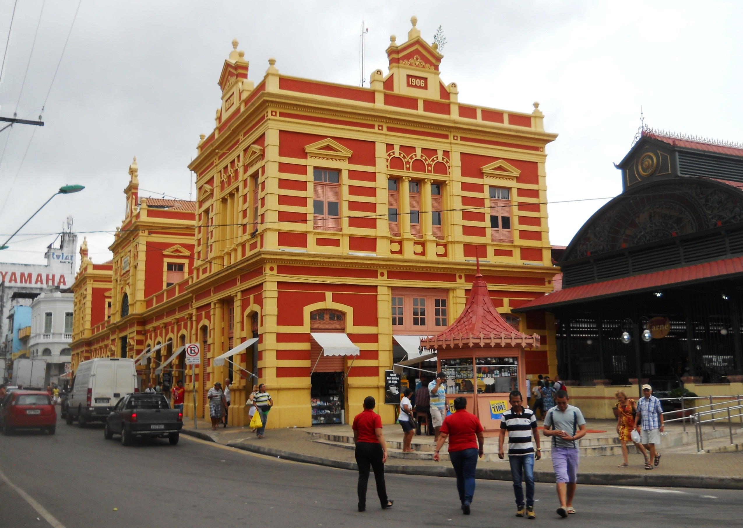 Imóvel denominado Mercado Adolfo Lisboa ou Mercado Municipal, compreendendo seus pavilhões e jardins, embarcadouro e trecho correspondente da margem do rio